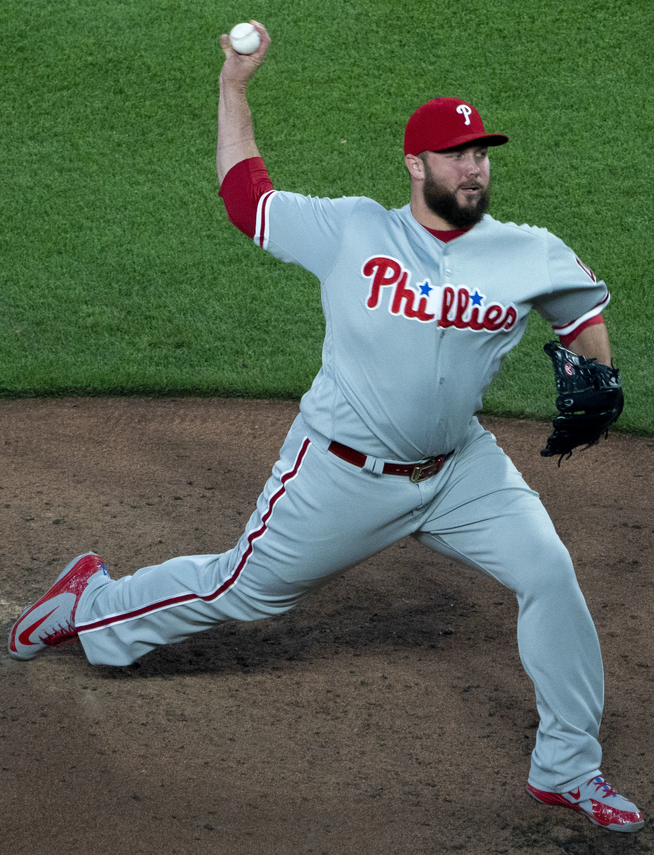 Phillies at Orioles 7/12/18